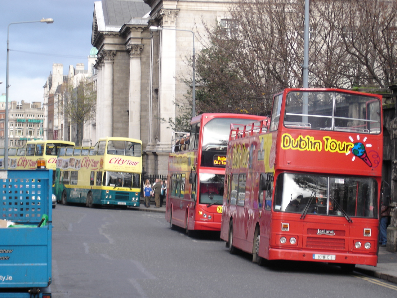 Turistbusser i Dublin. Foto: Ferale, desember 2005